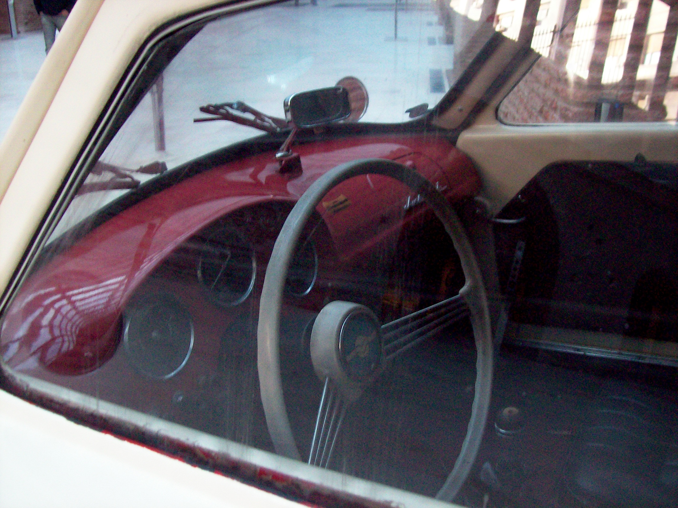 Interior de un modelo Justicialista Gran Sport del año 1954 exhibido en el Museo del Bicentenario, Buenos Aires.